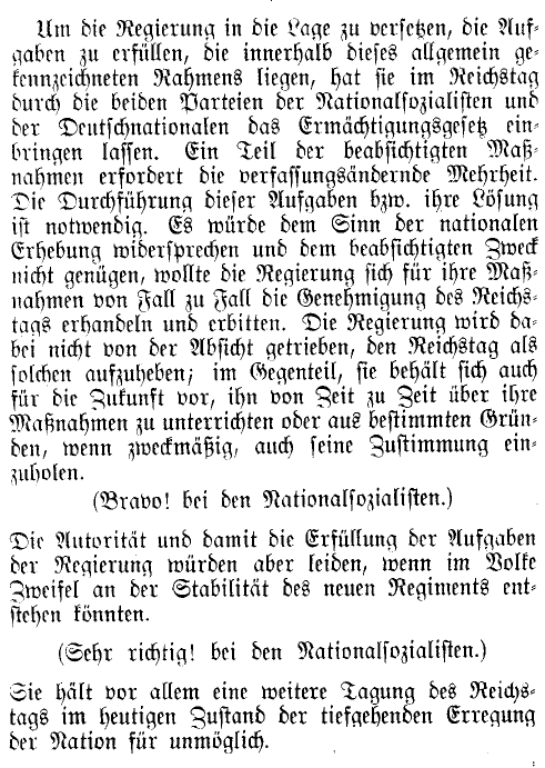 Diese Passage aus der etwa einstündigen Rede Adolf Hitlers als Reichskanzler im Deutschen Reichstag beschreibt die Kernaussage: Abschaffung der Demokratie. Hier der Wortlaut: „Um die Regierung in die Lage zu versetzen, die Aufgaben zu erfüllen, die innerhalb dieses allgemein gekennzeichneten Rahmens liegen, hat sie im Reichstag durch die beiden Parteien der Nationalsozialisten und der Deutschnationalen das Ermächtigungsgesetz einbringen lassen. Ein Teil der beabsichtigten Maßnahmen erfordert die verfassungsändernde Mehrheit. Die Durchführung dieser Aufgaben bzw. ihre Lösung ist notwendig. Es würde dem Sinn der nationalen Erhebung widersprechen und dem beabsichtigten Zweck nicht genügen, wollte die Regierung sich für ihre Maßnahmen von Fall zu Fall die Genehmigung des Reichstags erhandeln und erbitten. Die Regierung wird dabei nicht von der Absicht getrieben, den Reichstag als solchen aufzuheben; im Gegenteil, sie behält sich auch für die Zukunft vor, ihn von Zeit zu Zeit über ihre Maßnahmen zu unterrichten oder aus bestimmten Gründen, wenn zweckmäßig, auch seine Zustimmung einzuholen. (Bravo! bei den Nationalsozialisten.) Die Autorität und damit die Erfüllung der Aufgaben der Regierung würden aber leiden, wenn im Volke Zweifel an der Stabilität des neuen Regiments entstehen könnten. (Sehr richtig! bei den Nationalsozialisten.) Sie hält vor allem eine weitere Tagung des Reichstags im heutigen Zustand der tiefgehenden Erregung der Nation für unmöglich.“